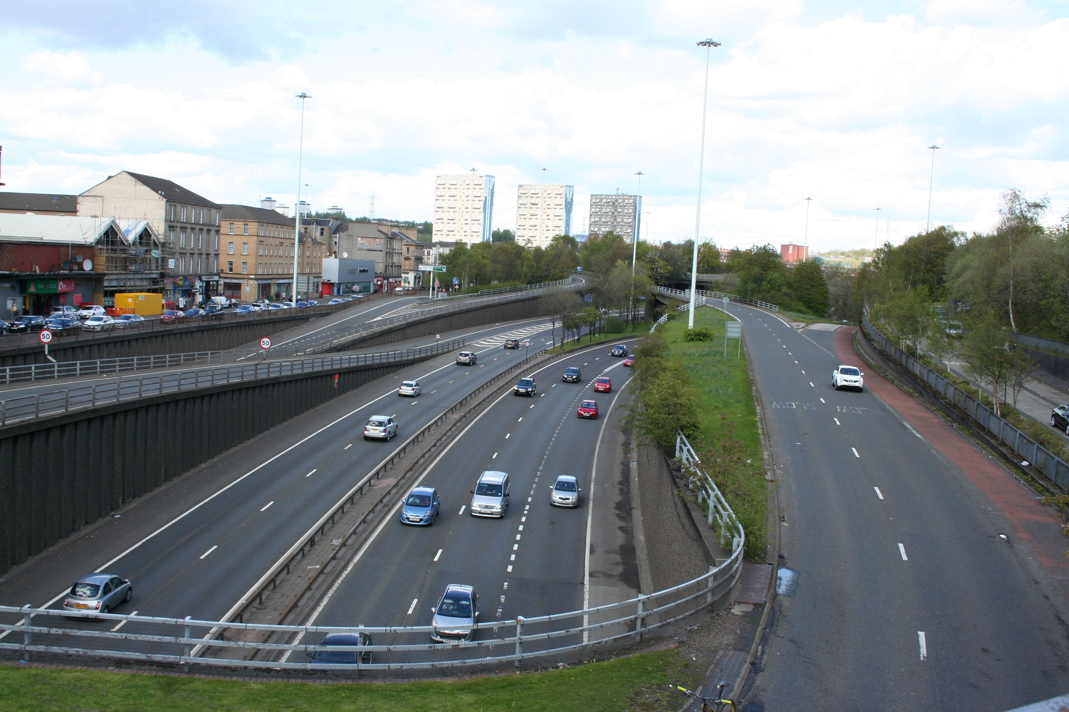 Autobahnanschluss (M8) Charing Cross in Glasgow (Mehr Informationen).